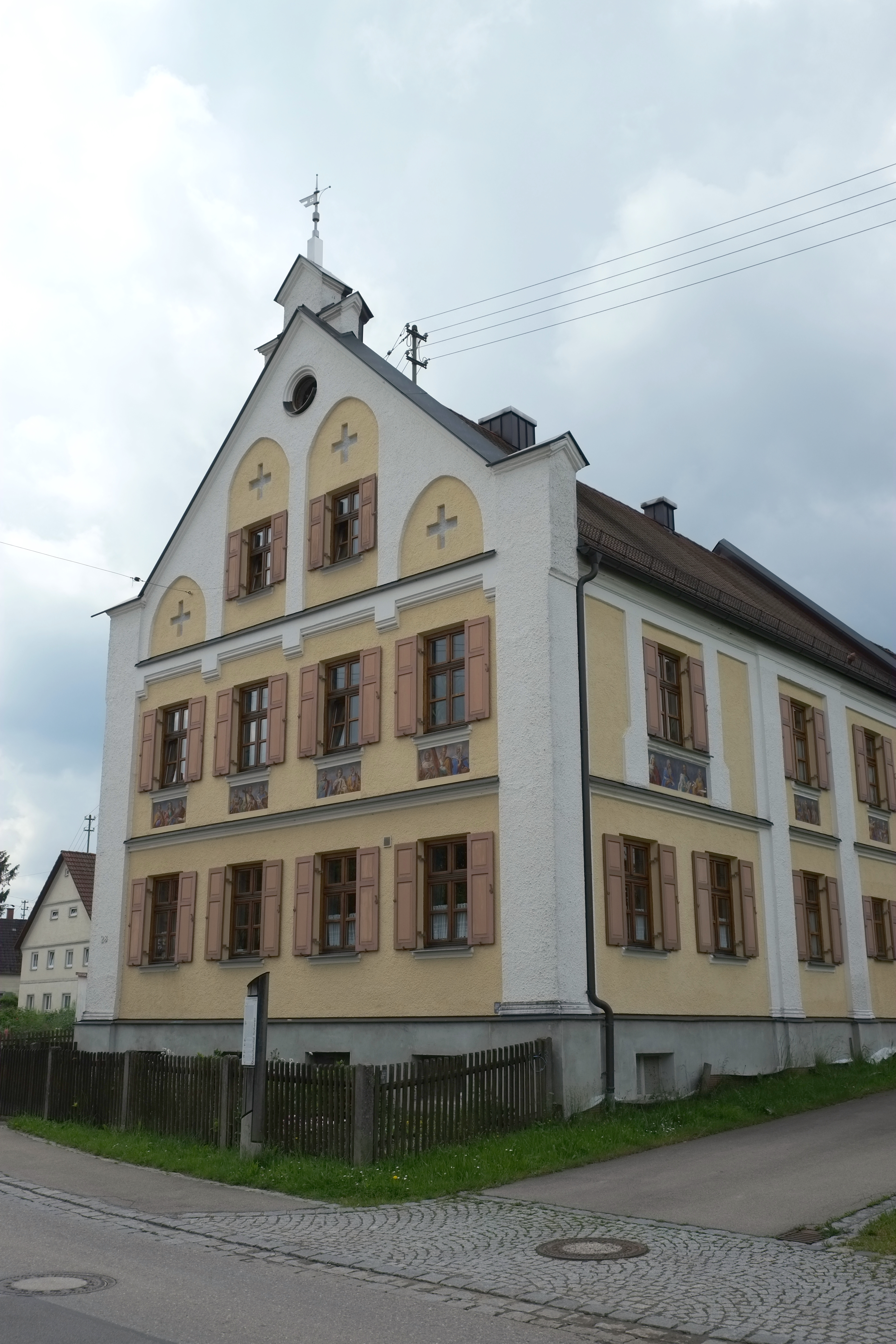 Haus der Malerfamlie Scherer, Von-Schnurbein-Straße 28, in Ettelried, einem Ortsteil von Dinkelscherben im Landkreis Augsburg (Bayern)